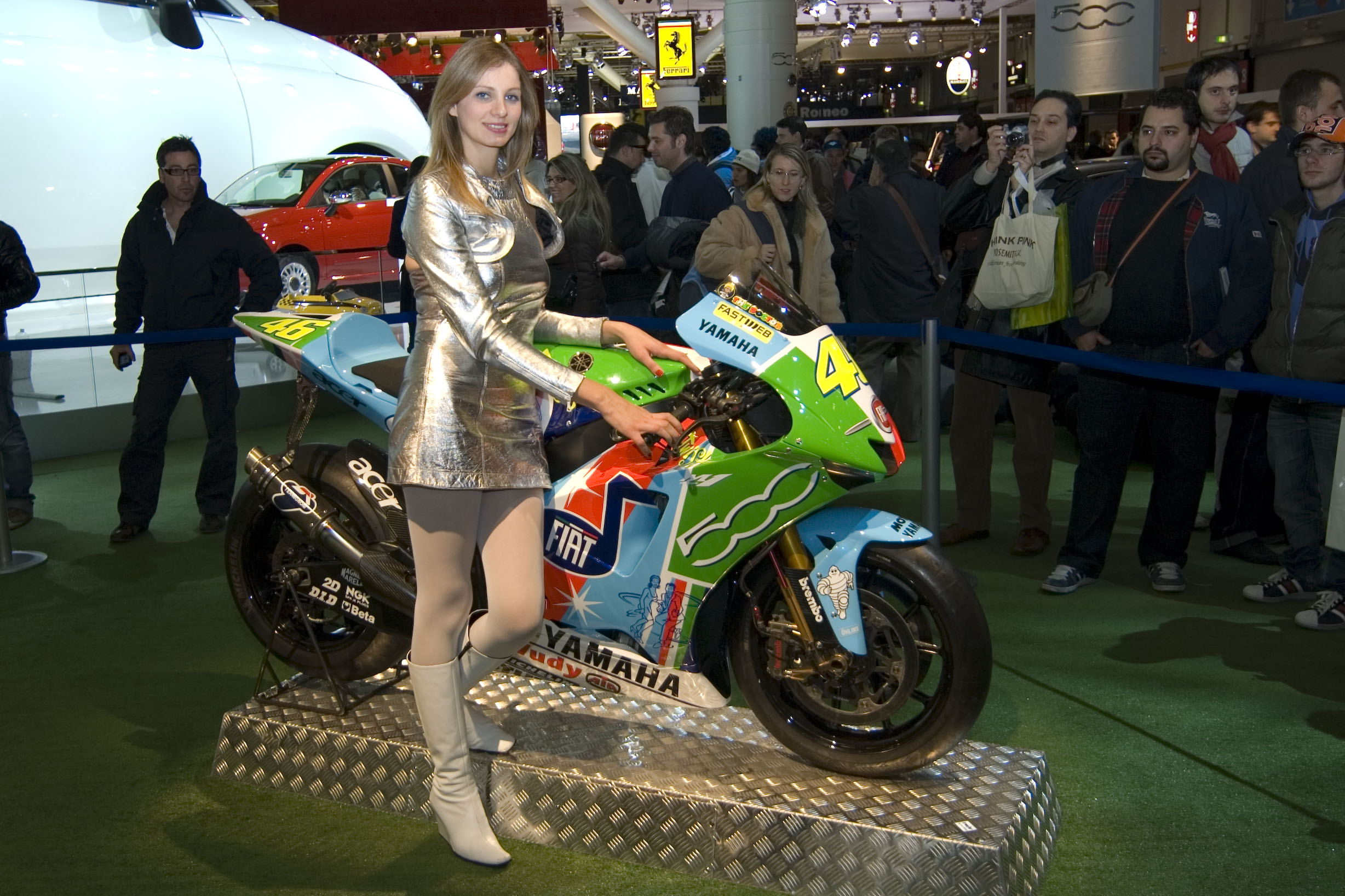 Motor Show 2007: Gnocca con la moto di Valentino